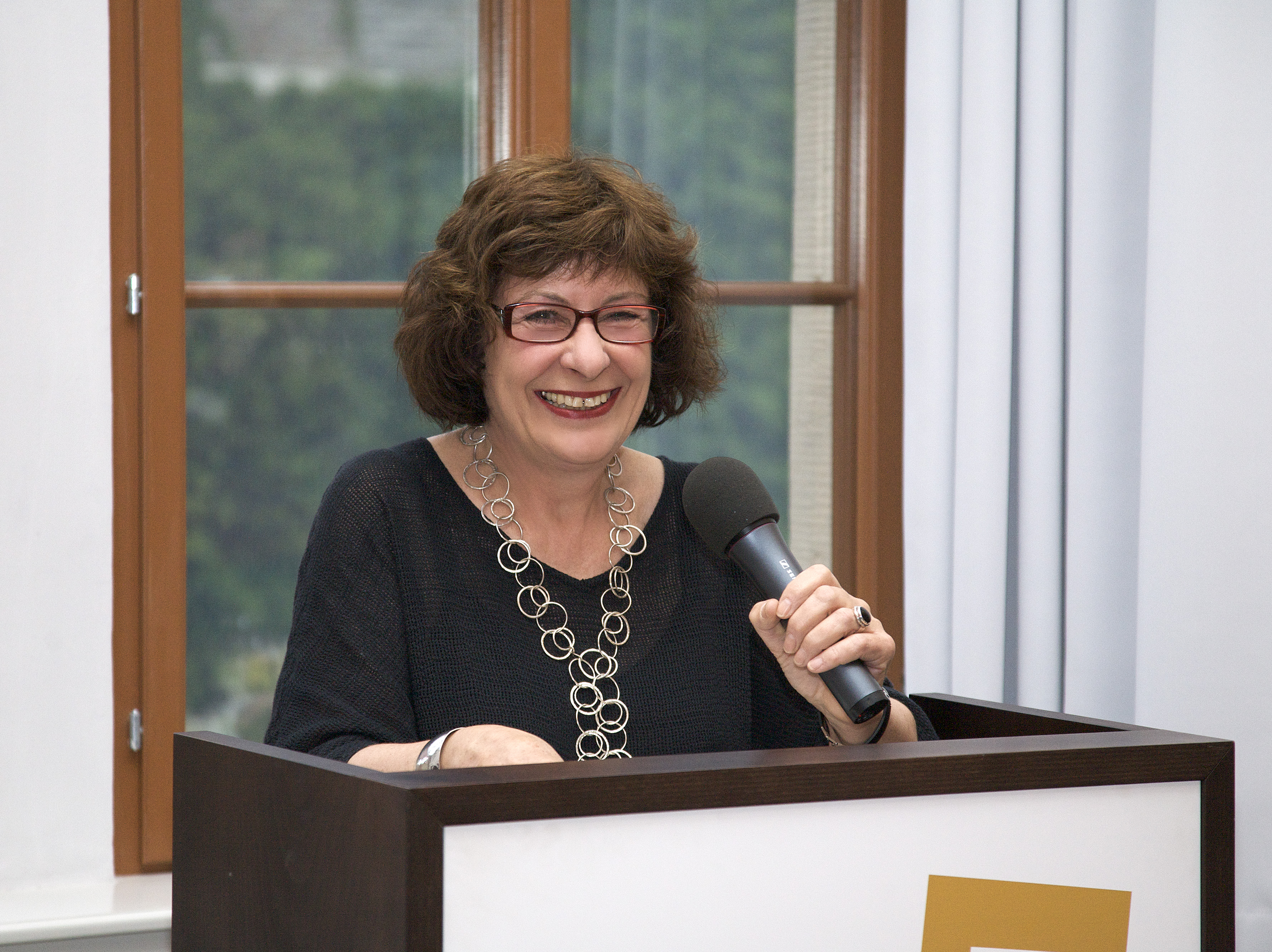 Jahrestagung 2009 Weimar, Dankesrede